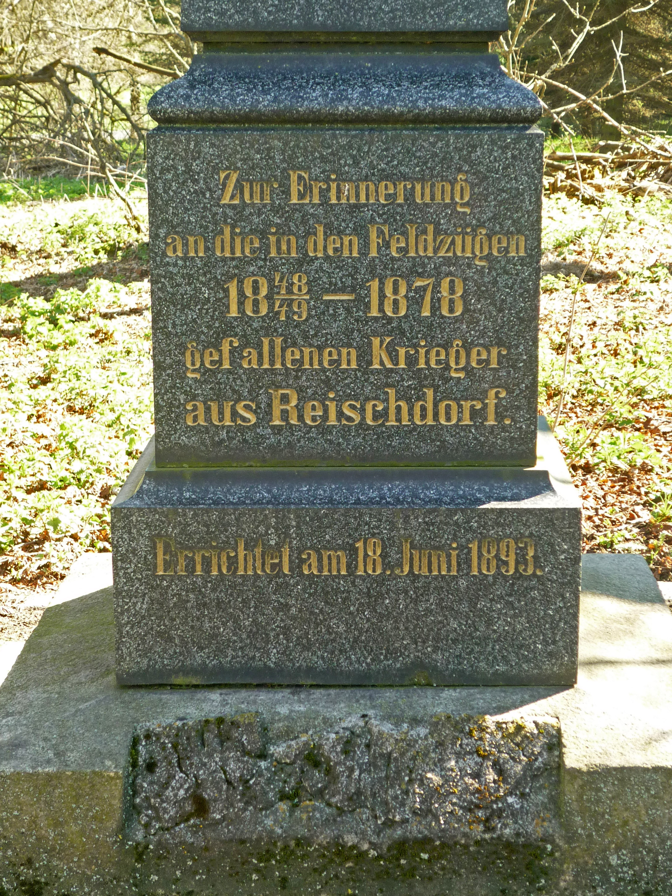 Kriegerdenkmal im ehem. Ort Reischdorf (Rusová) bei Preßnitz (Přísečnice)